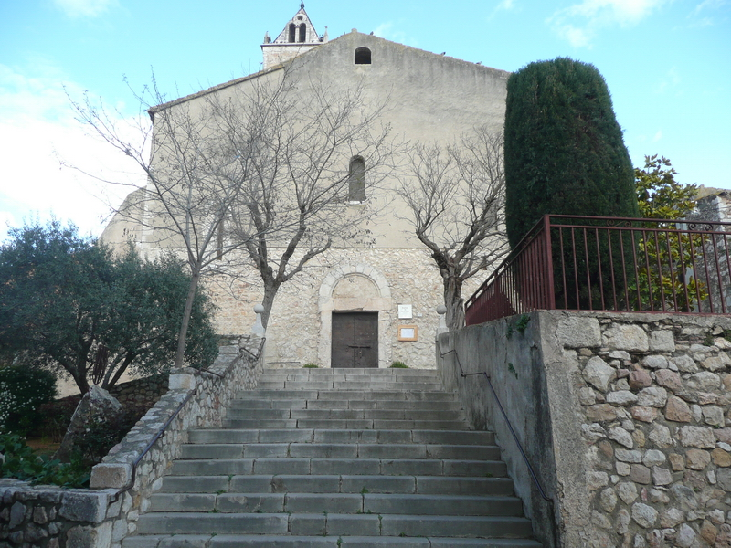 Santa Maria de Vilanant (Alt Empordà)